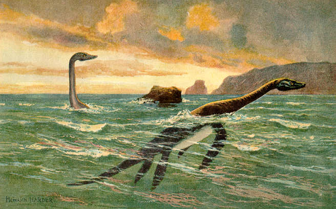 Plesiosaur